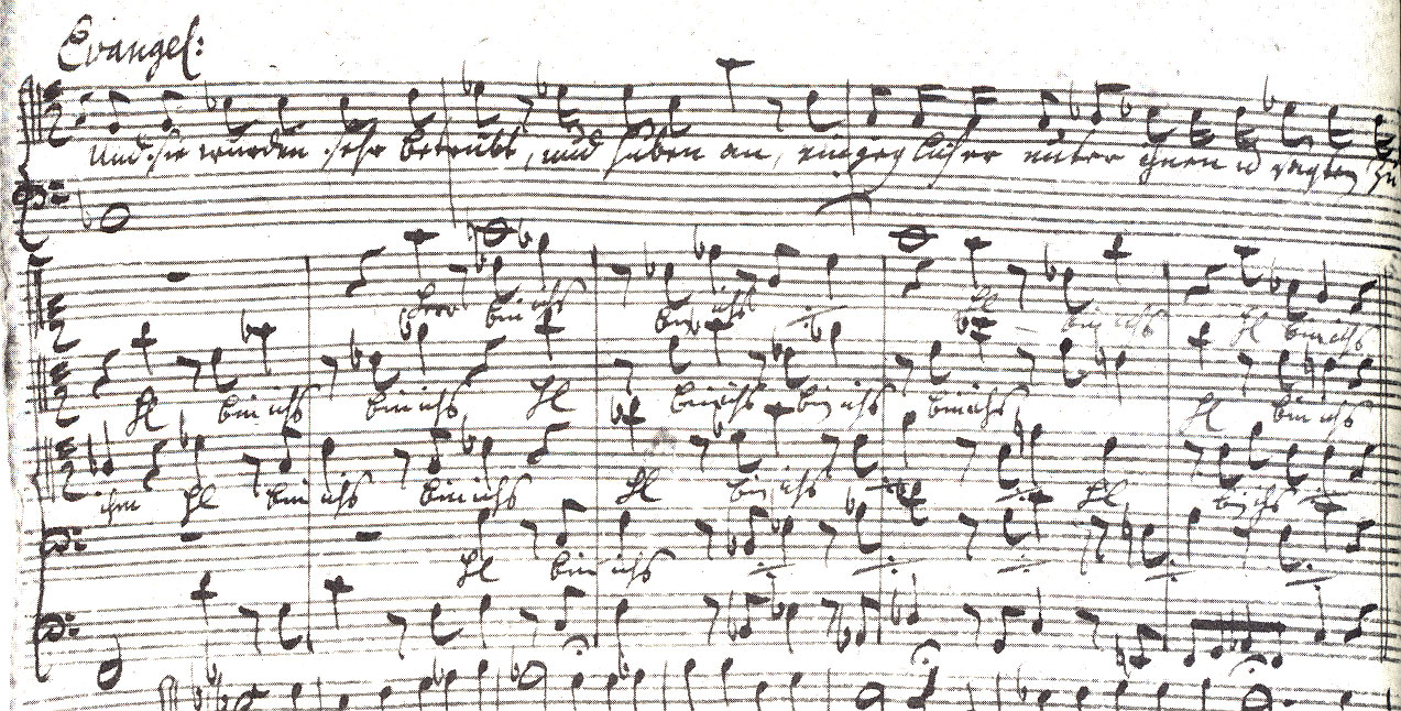 Речитатив "Und sie wurden sehr betrübt" из J.S.Bach "Matthäus-Passion"